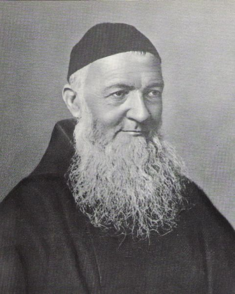 Portät von Theodosius Florentini (1808-1865)